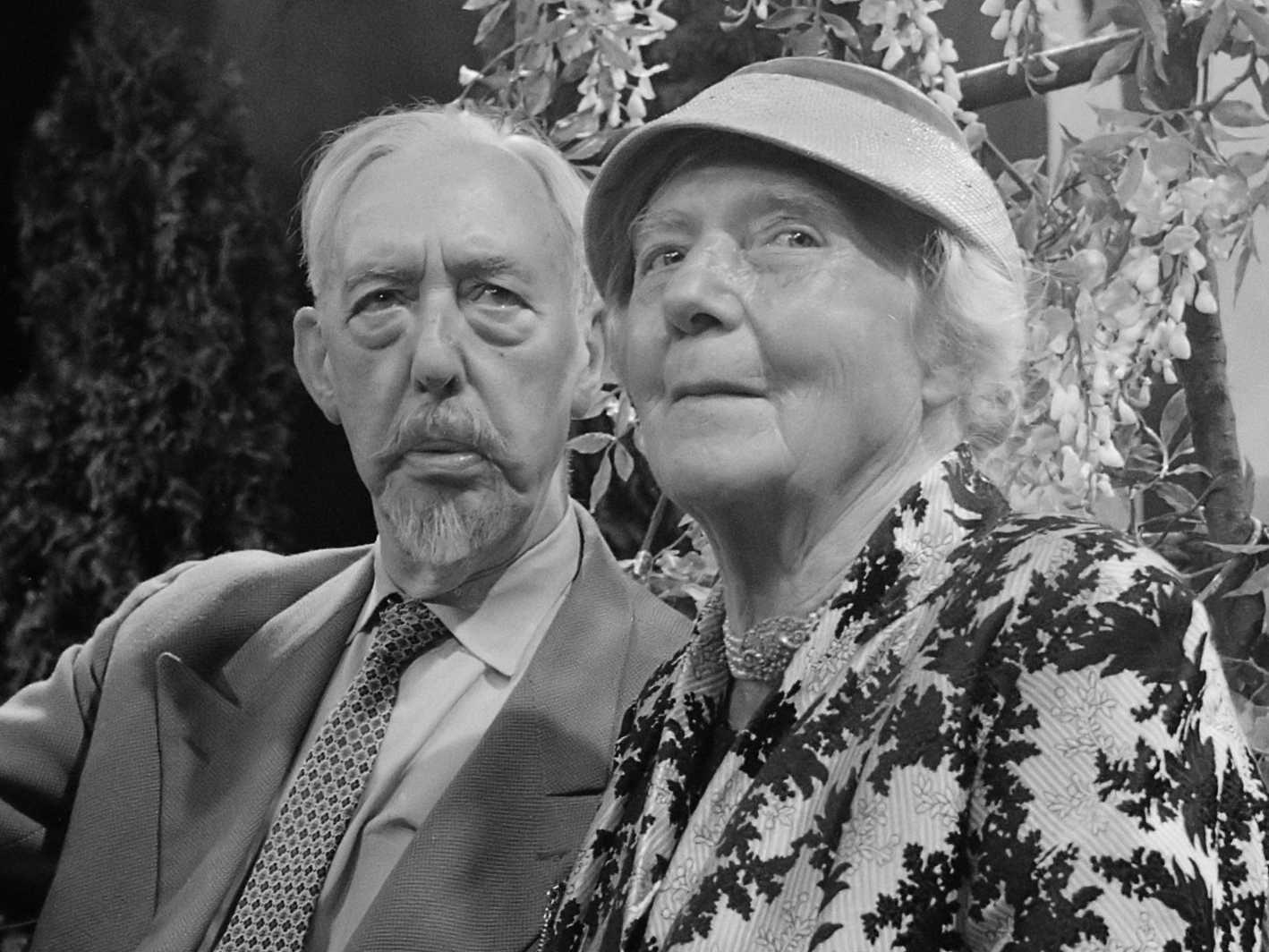 TV Zonnige morgen met Jacqueline Royaards en Philippe la Chapelle 8 augustus 1962